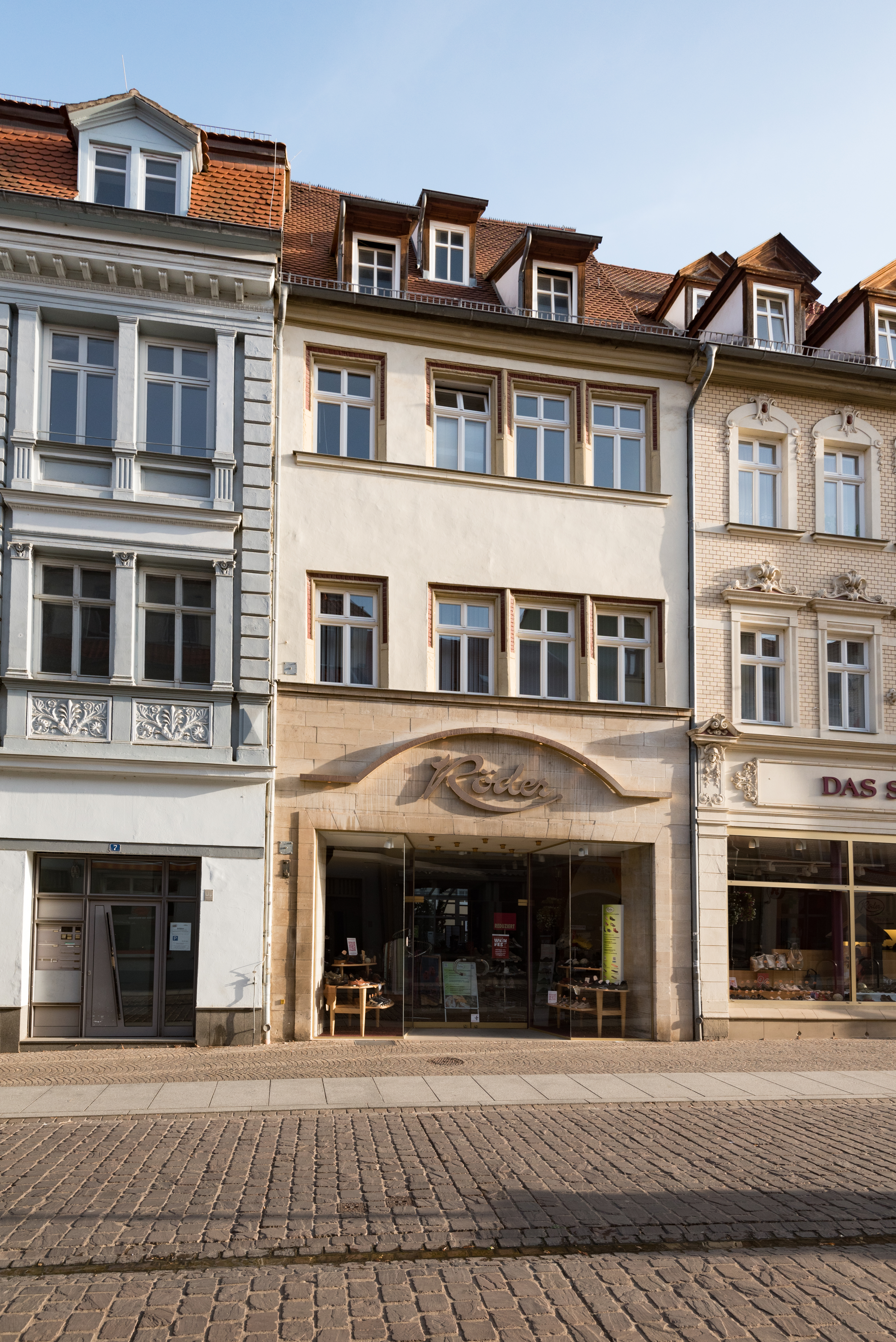 Naumburg (Saale), Jakobstraße 6